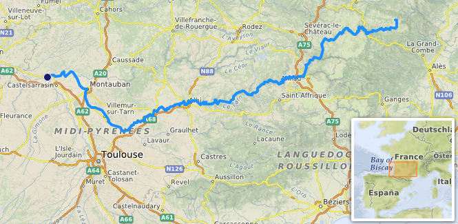 carte réalisée sur umap [1] This map may be incomplete, and may contain errors. Don't rely solely on it for navigation.